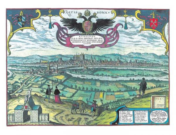 Regensburg, aus Braun & Hogenberg